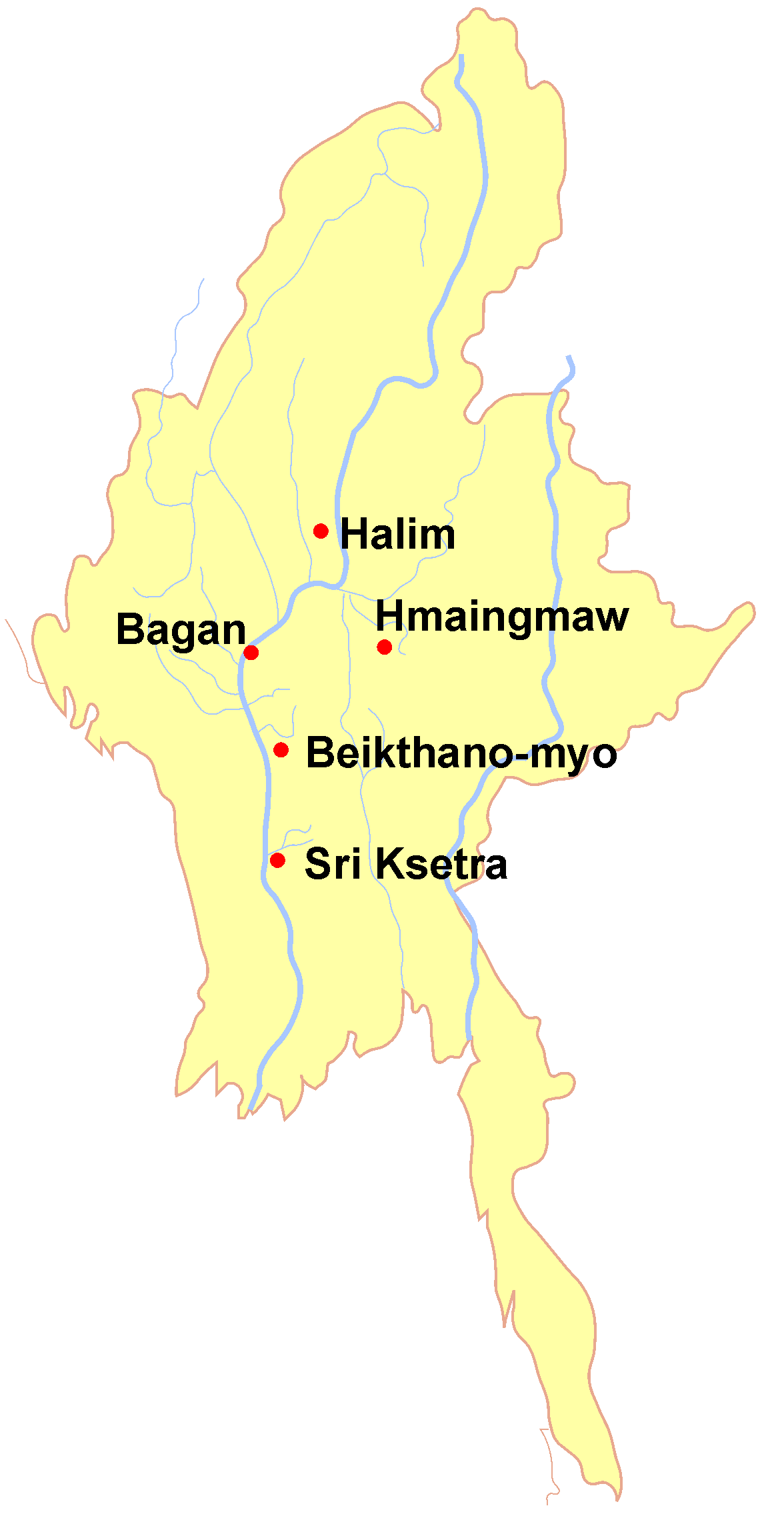 Pyu sites in Myanmar